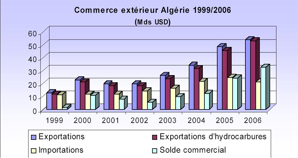 évolution du commerce extérieur de l'Algérie entre 1999 et 2006